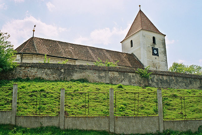 Die lutherische Kirche von Hammersdorf